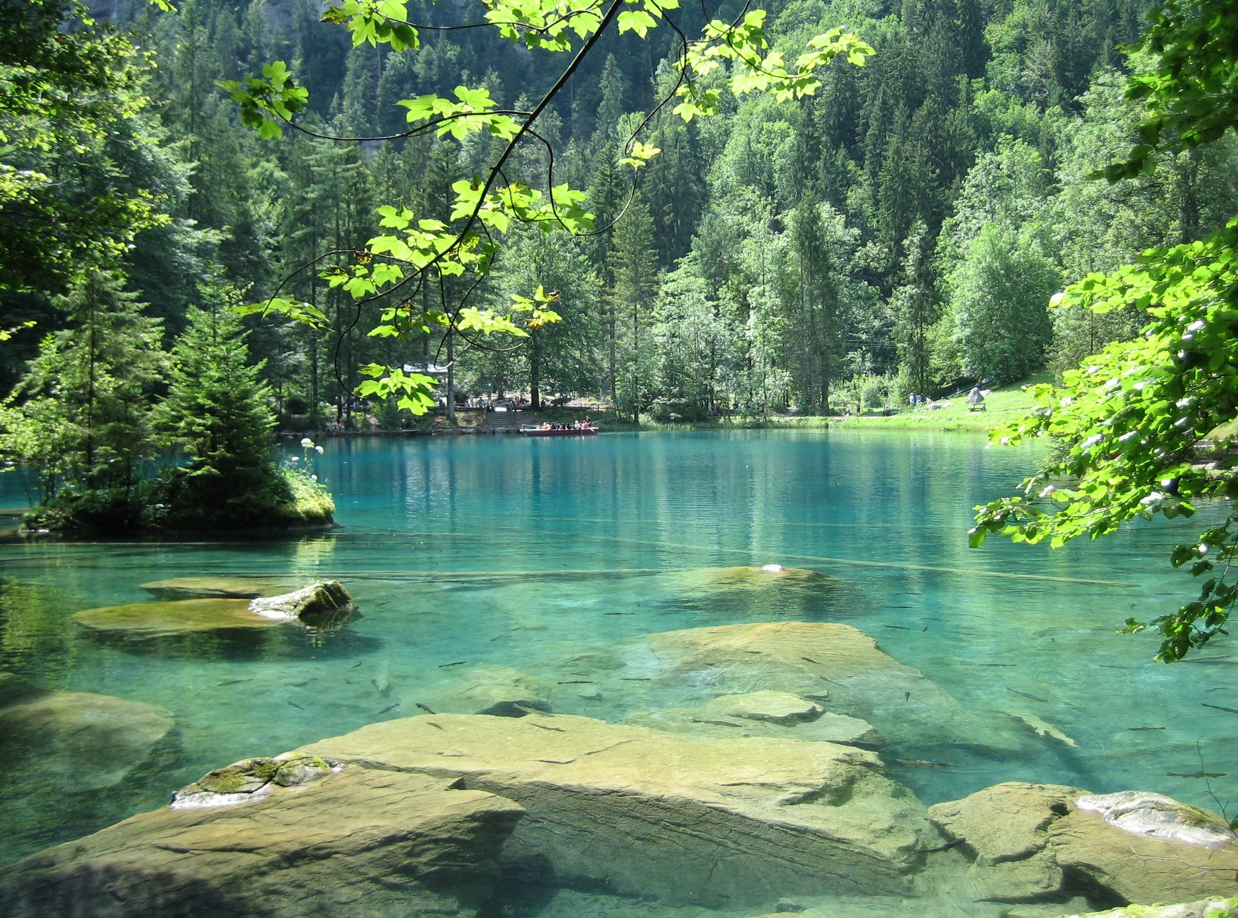 Blausee im Berner Oberland